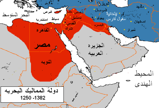 مصرى: الدوله المملوكيه فى أكبر توسع ليها.